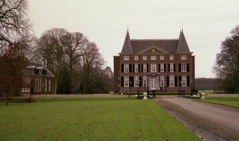 Kasteel Hardenbroek te Driebergen-Rijsenburg.